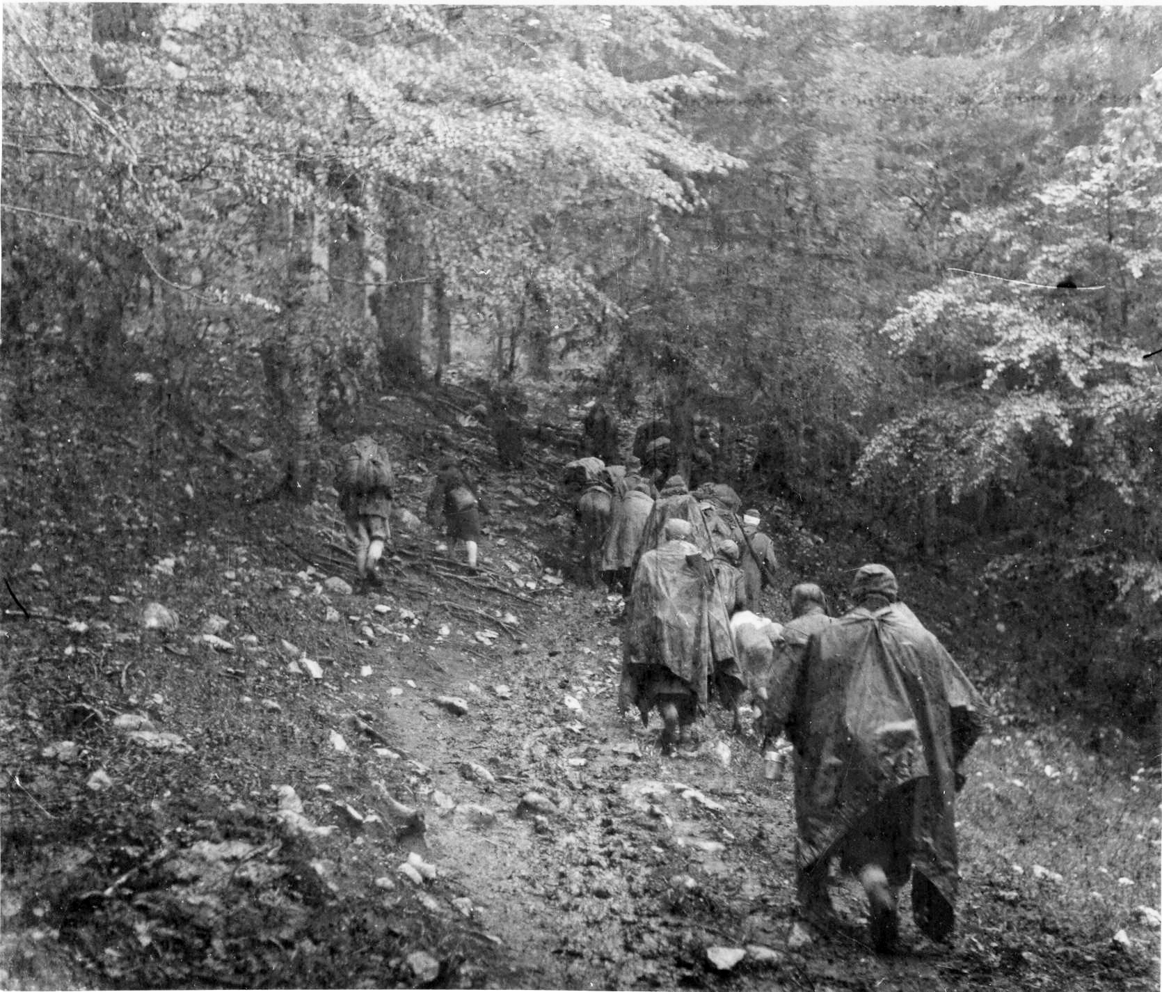 Srpskohrvatski / српскохрватски: Pokret boraca Četvrte crnogorske brigade prema Miljevini, tokom bitke na Sutjesci, 12. juna 1943.